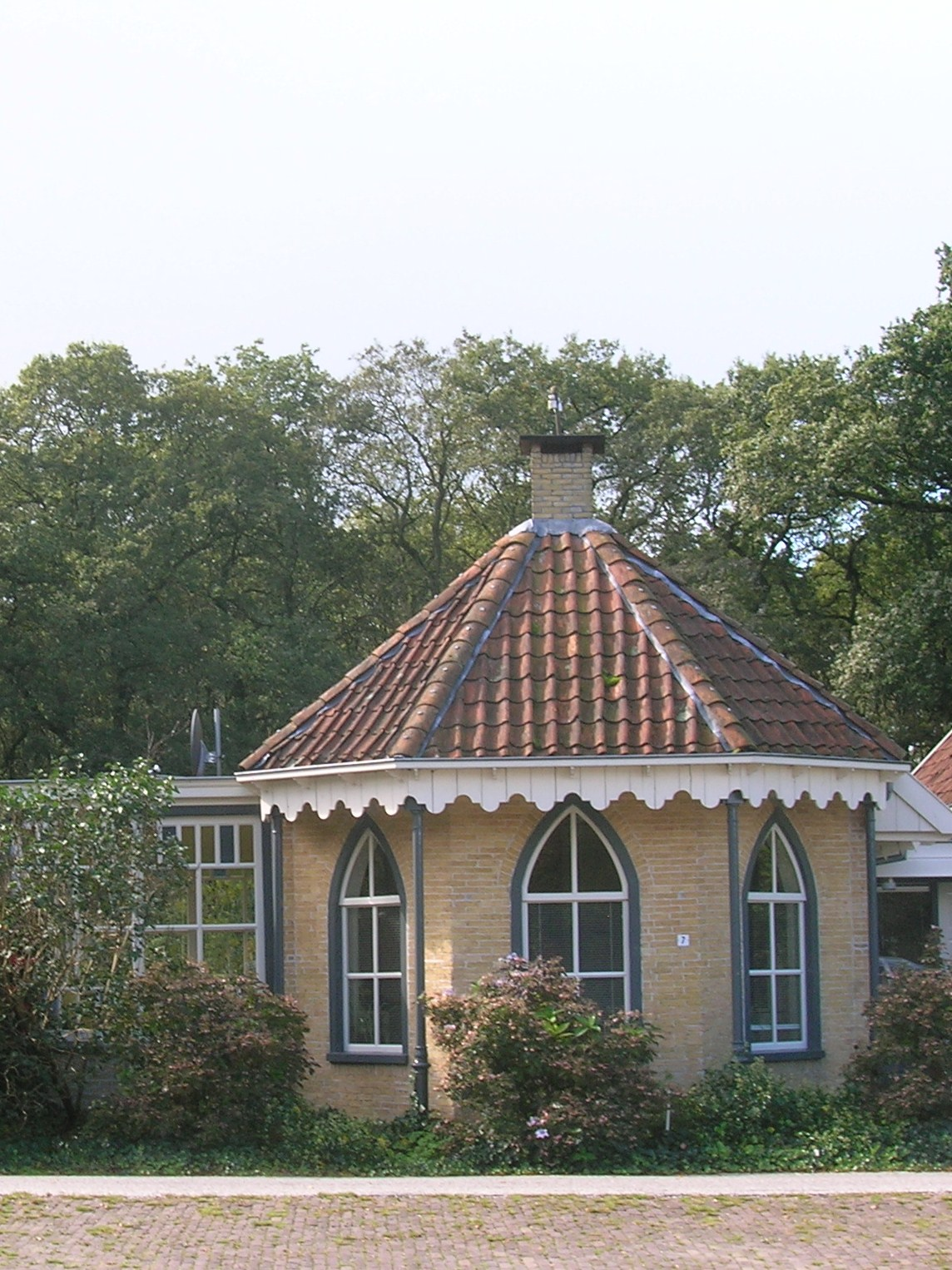 Het goddeloze tolhek/Vlinderhuisje, Lippenhuizen. In gebruik als woning.